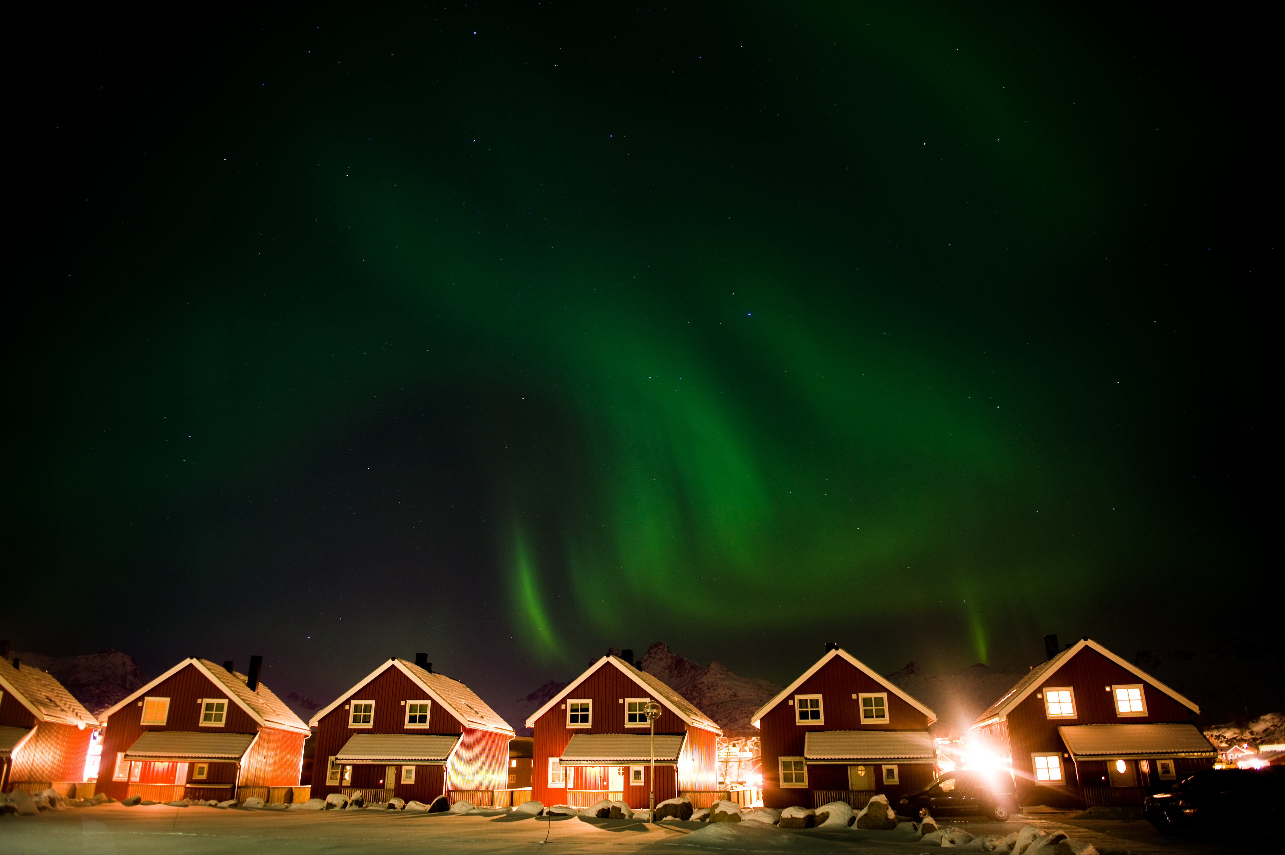 Velferdstjenesten i Bodø arrangerte velferdstur til Svolvær.